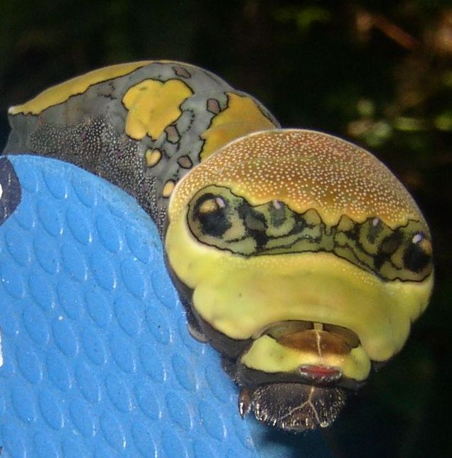 Raupe in Florianópolis